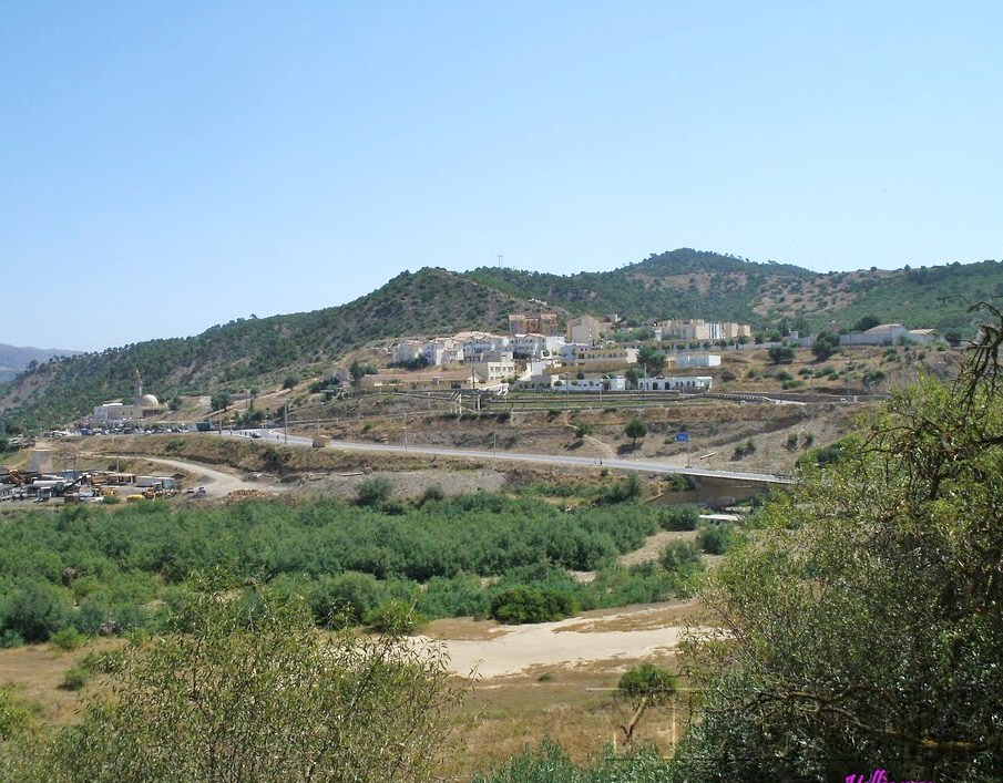 Cmmune de Mezghena dans le Titteri, Wilaya de Médéa (Algérie).